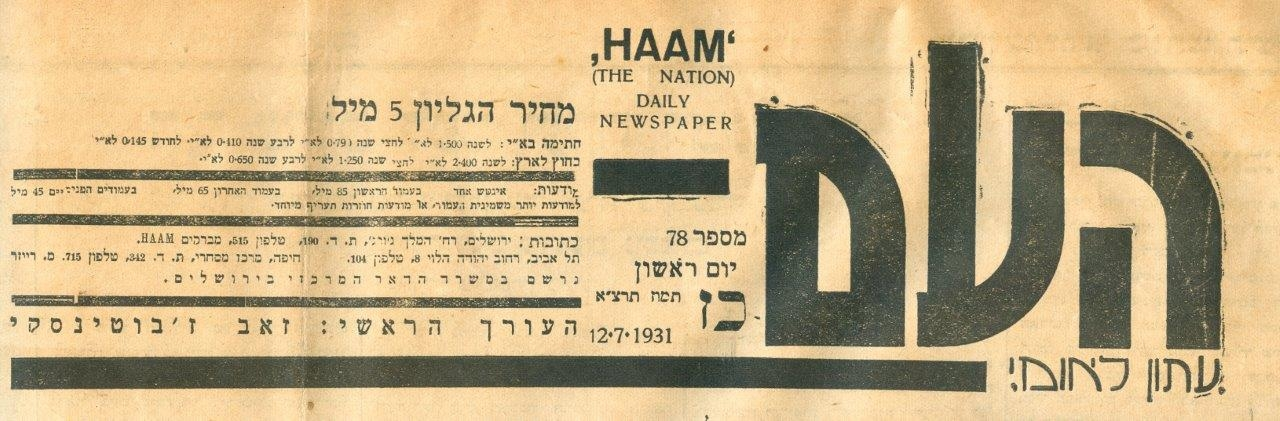 כותרת גיליון "העם" יולי 1931